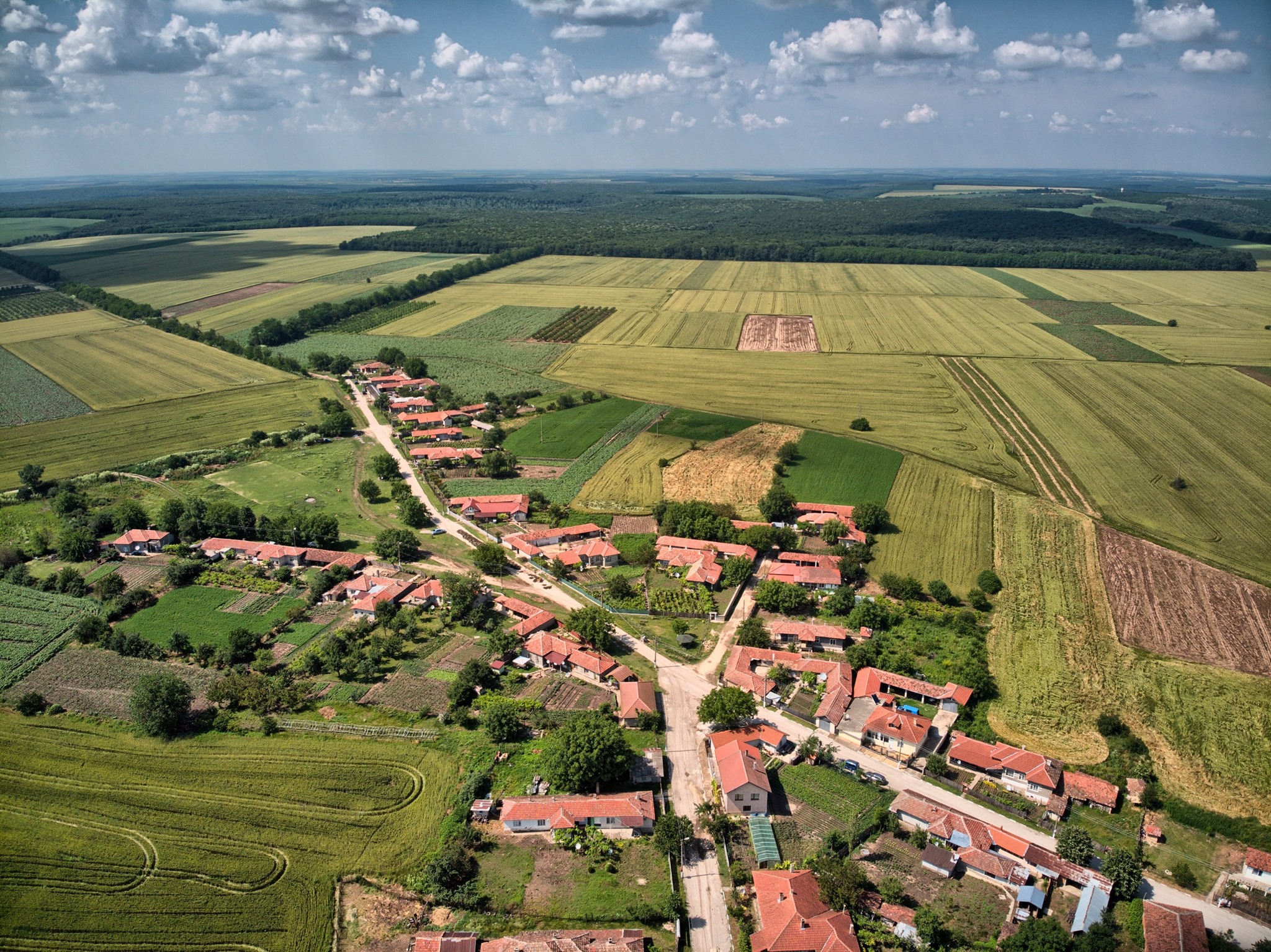 село Зарица